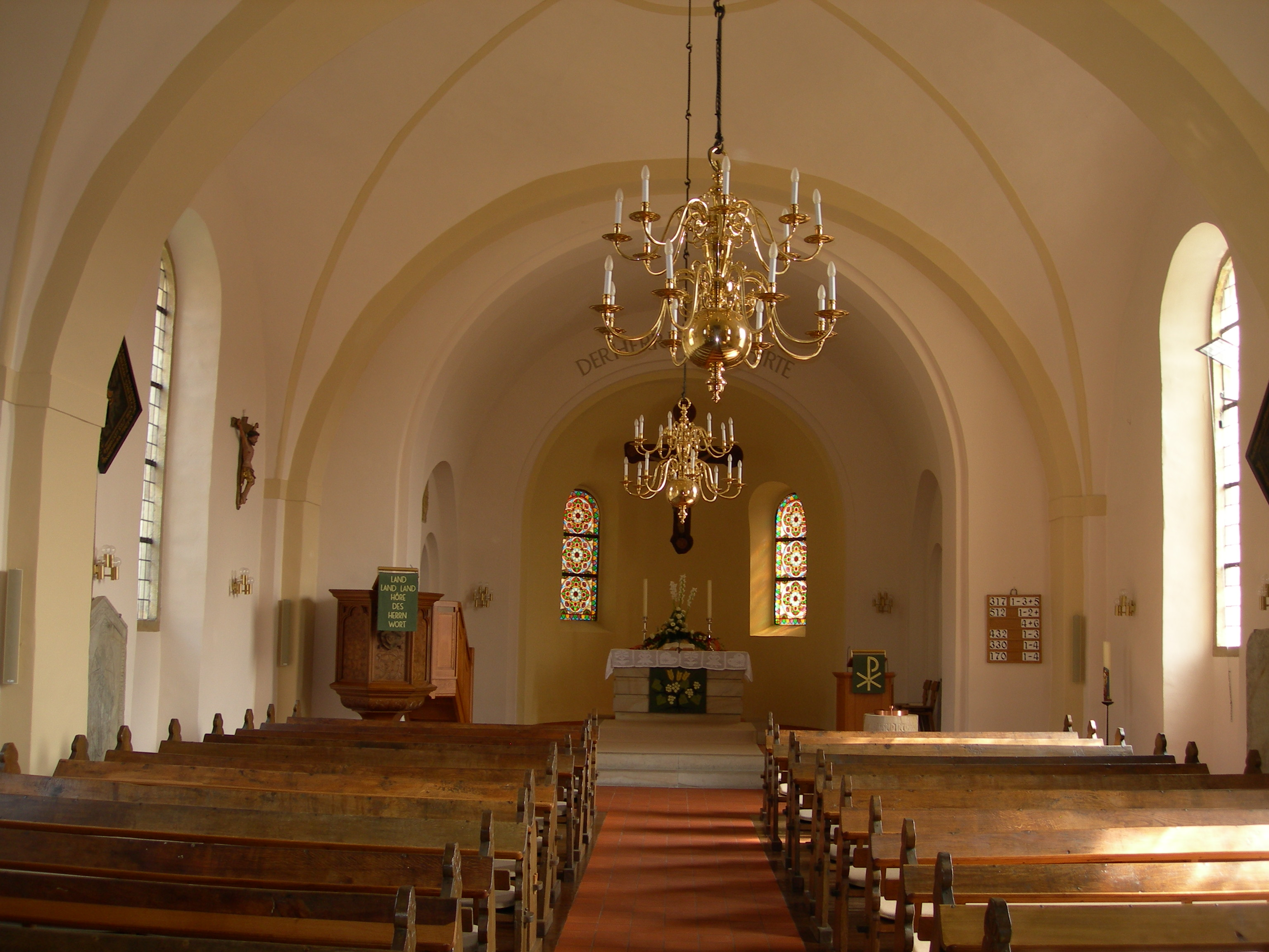 Urbankirche (Holte): Blick auf den Altar